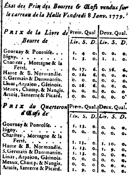 Prix des beurres et des oeufs à Paris, le 8 janvier 1779. Extrait du Journal de Paris du lendemain, le 9 janvier, p. 35.